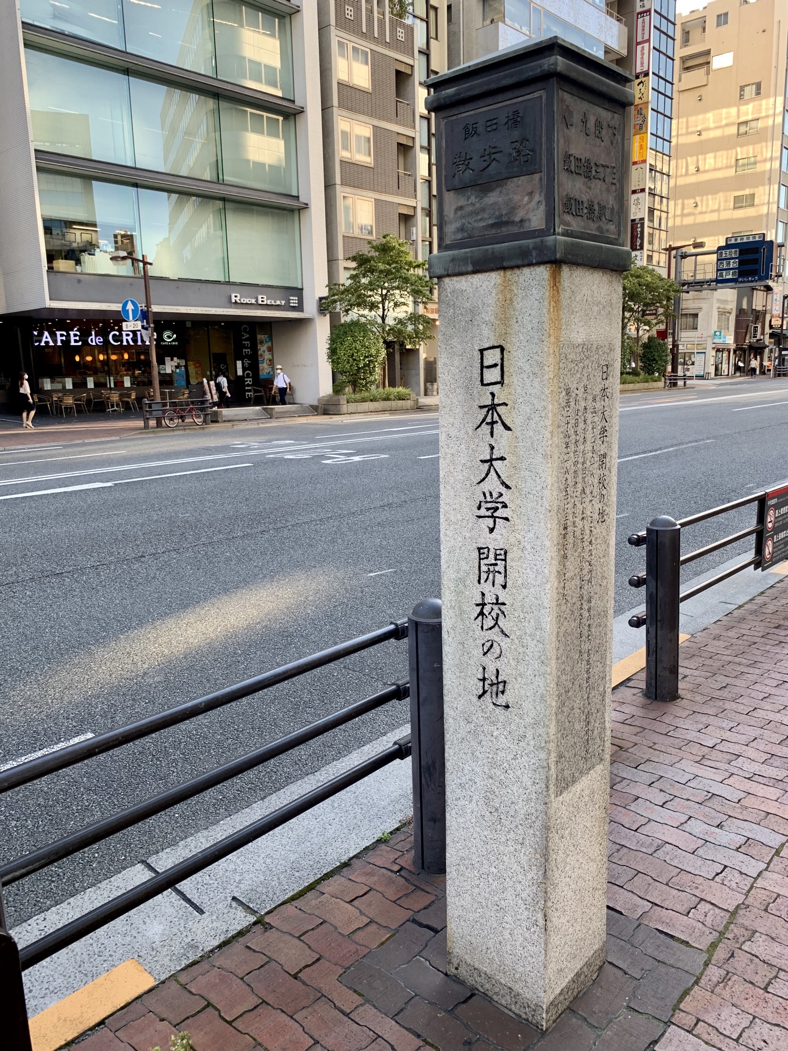 東京区政会館前の「日本大学 開校の地」の碑